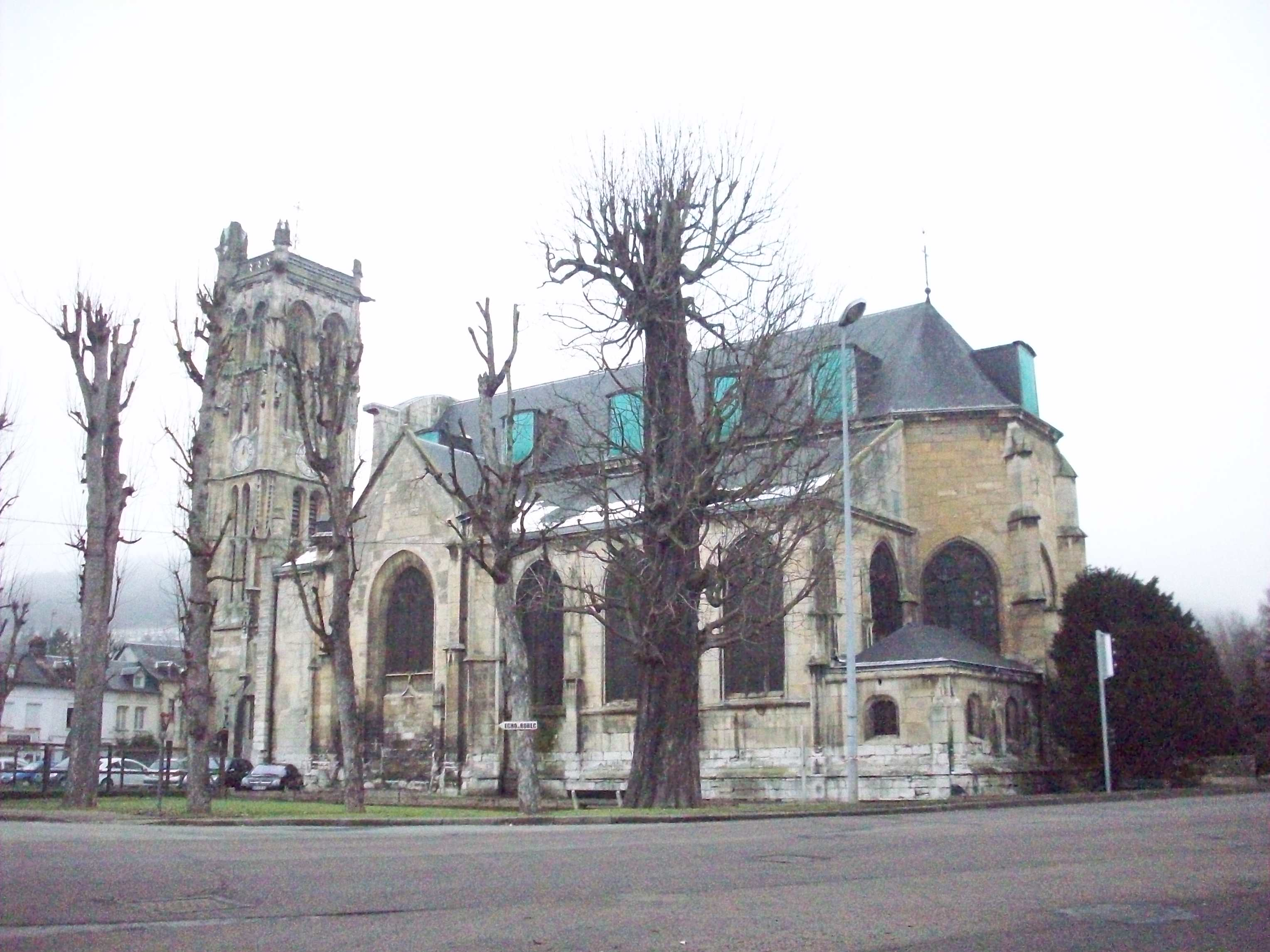 Eglise de Carville, à Darnétal.